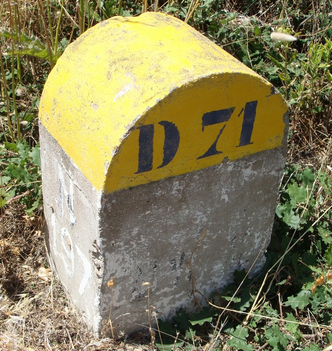 Borne sur la D 71 actuelle, sur le flanc de laquelle figure la mention de l'ancien classement de la route, RN 197.